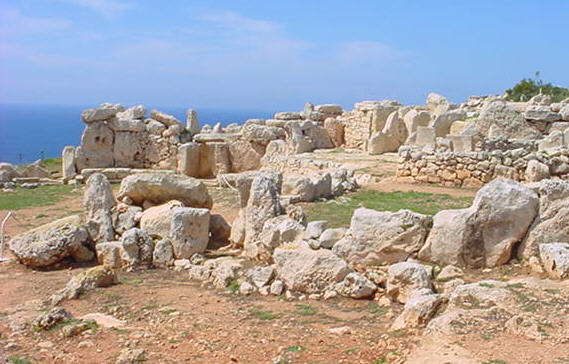 Das Bild zeigt einen Ausschnitt der Tempelanlage Mnajdra auf Malta. Abgebildet ist der ältere Teil der Anlage, der auf ein Alter von ca. 5500 Jahren geschätzt wird. Der jüngere Teil schließt rechts an und ist etwa 4800 Jahre alt.